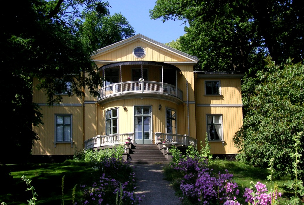 Listonhill på Djurgården